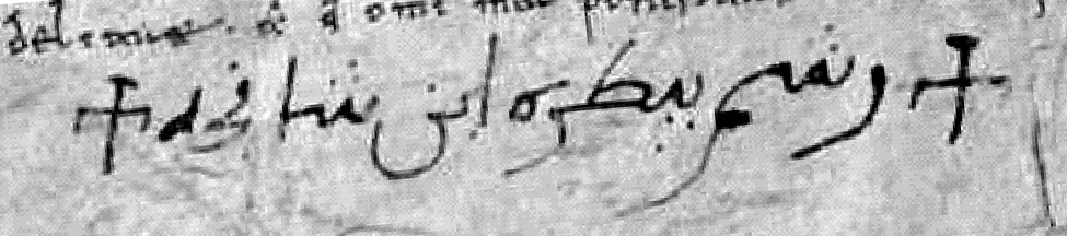 Suscripción en árabe de Pedro I de Aragón. Transliteración: . Transcripción fonética en árabe dialectal andalusí: /ráš(a)m Béṭro (a)ben Šánǧo/ o /ráš(a)m Péṭro (a)ben Šánčo /. Traducción al español: 'Señal [=signum] de Pedro, hijo de Sancho'. Francisco J. Hernández (en su art. «En la prehistoria...», págs. 257-278), considera la subscripción equivocadamente como «su nombre escrito en aljamiado» y transcribe «rex Pedro ben Xancho» y «rey Pedro aben Sancho»”. Sin embargo el texto está en árabe andalusí, y equivale a la expresión «Signum Petri Sancii» en latín, usada por el futuro Pedro I de Aragón cuando aún era príncipe. Fuente de la información: Alberto Montaner Frutos, «La Historia Roderici y el archivo cidiano: cuestiones filológicas, diplomáticas, jurídicas e historiográficas», e-Legal History Review 12, 2011, notas 219 y 220. ISSN 1699-5317 Bibliografía: Antonio Ubieto Arteta, Colección diplomática de Pedro I de Aragón y de Navarra, Escuela de Estudios Medievales (CSIC), Zaragoza, 1951, págs.18-19 y 40. Francisco J. Hernández, «En la prehistoria de la materia épica cidiana: el Cid no era el Cid», en Revista de Filología Española vol. 89, 2009, págs. 257-278 (en págs. 264 y 276). Alberto Montaner Frutos, «La Historia Roderici y el archivo cidiano: cuestiones filológicas, diplomáticas, jurídicas e historiográficas», e-Legal History Review 12, 2011, notas 219 y 220. ISSN 1699-5317